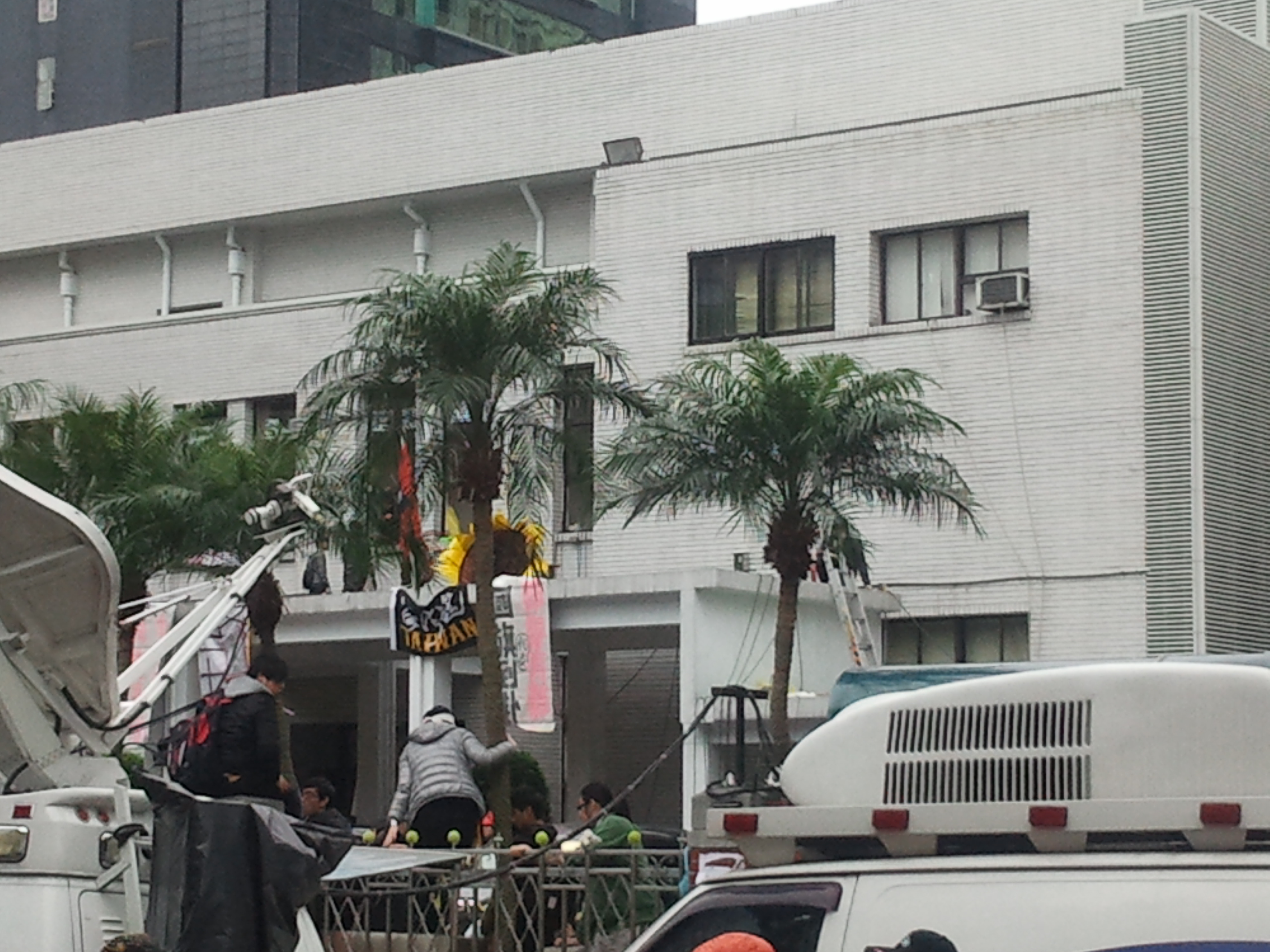 中文（台灣）: 學生們爬鐵踢進入議場